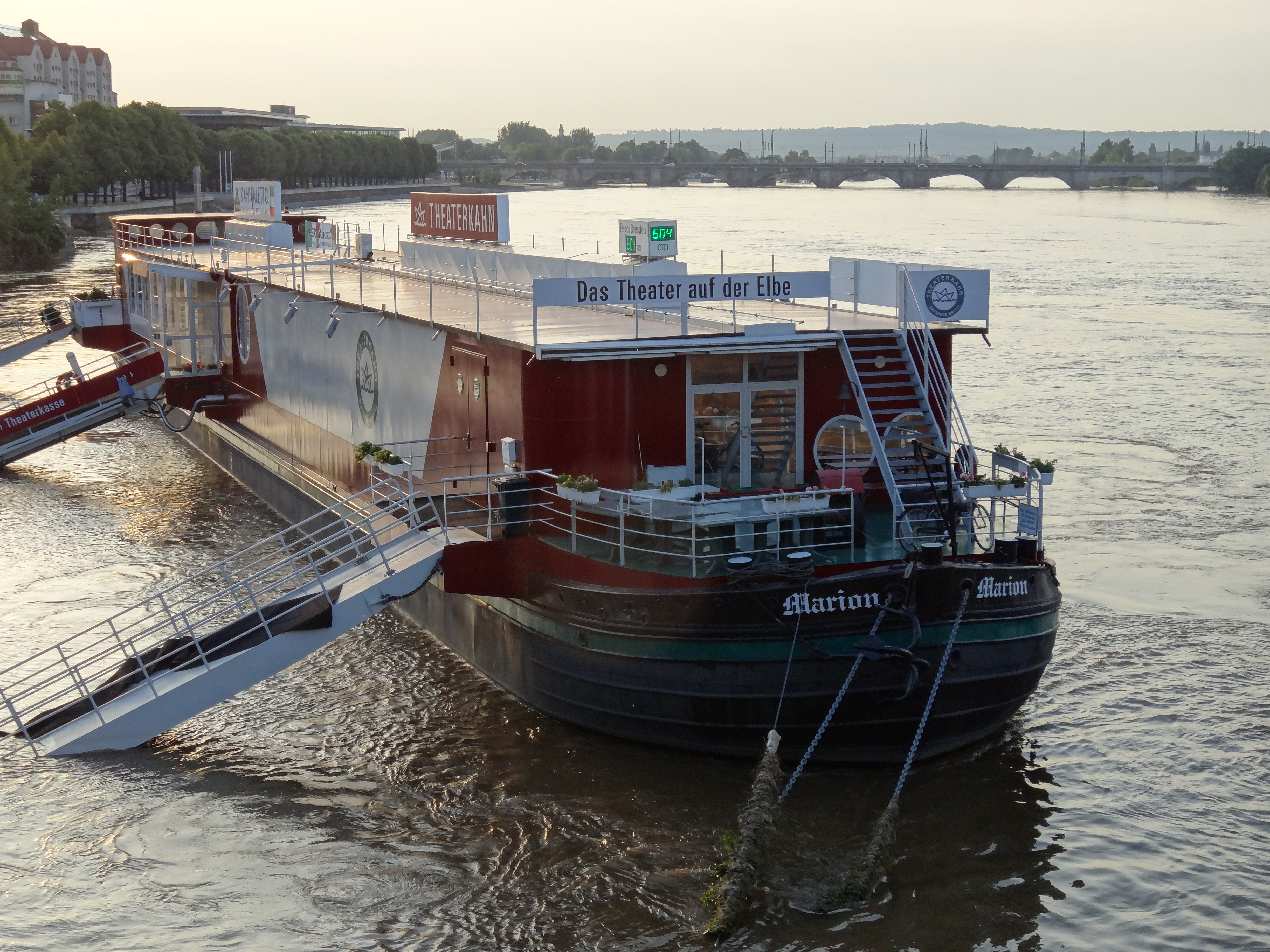 Dresden